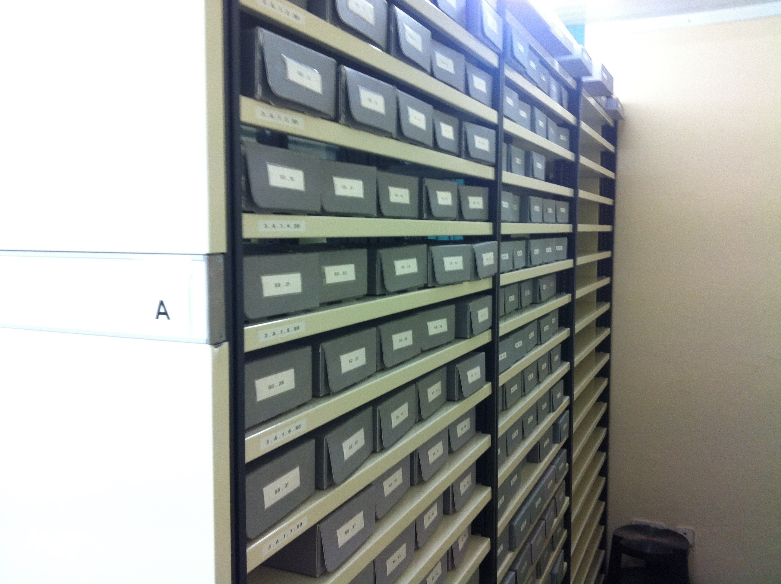 Magatzems de l'Arxiu Fotogràfic de Barcelona